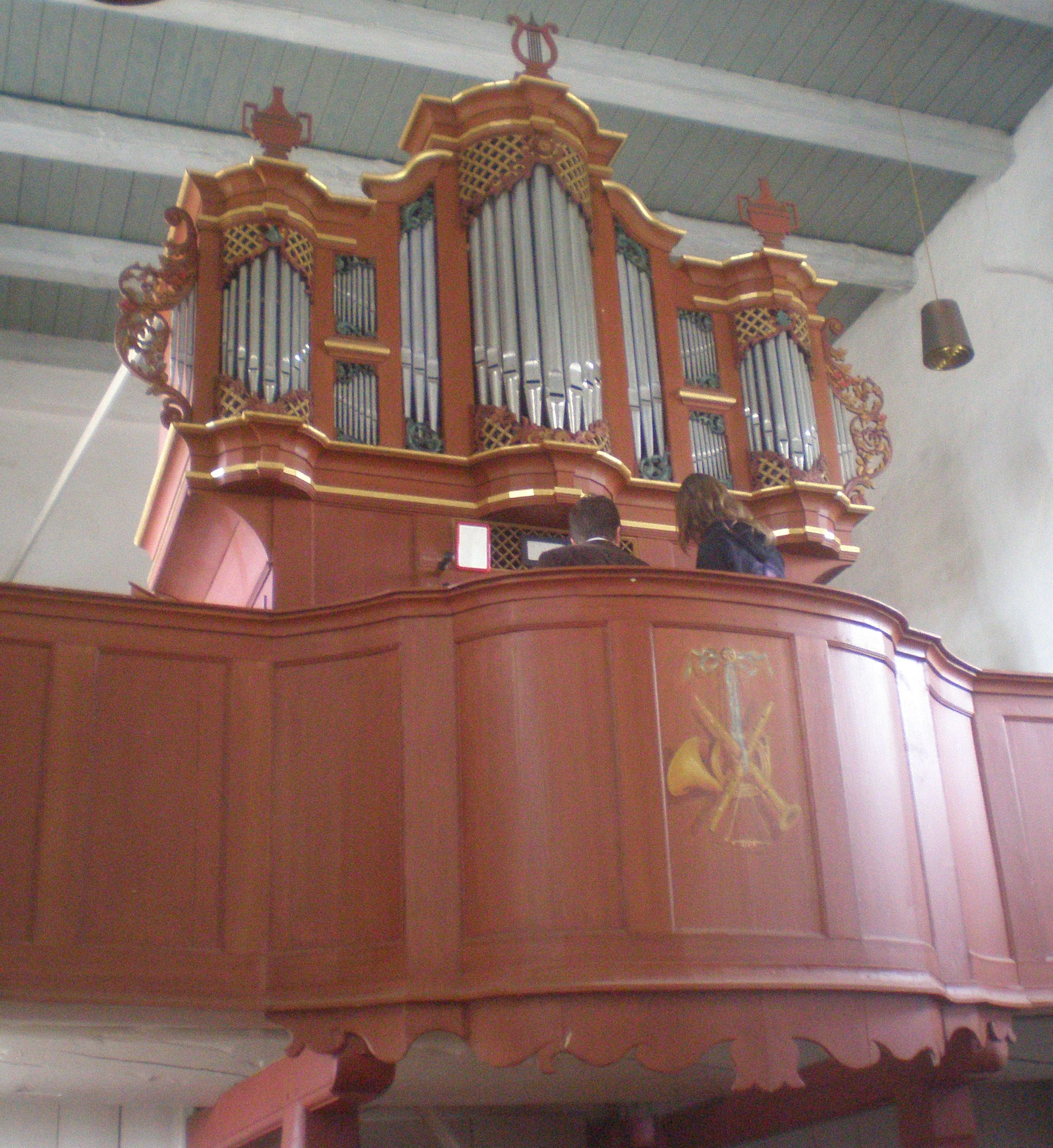 Orgel in Roggenstede